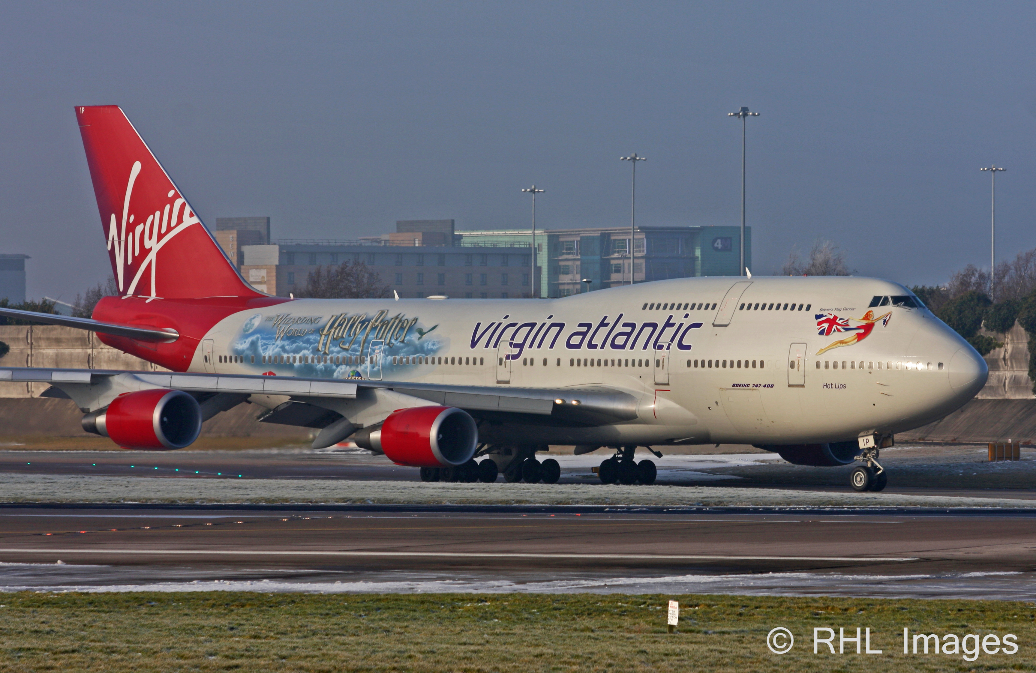 Manchester